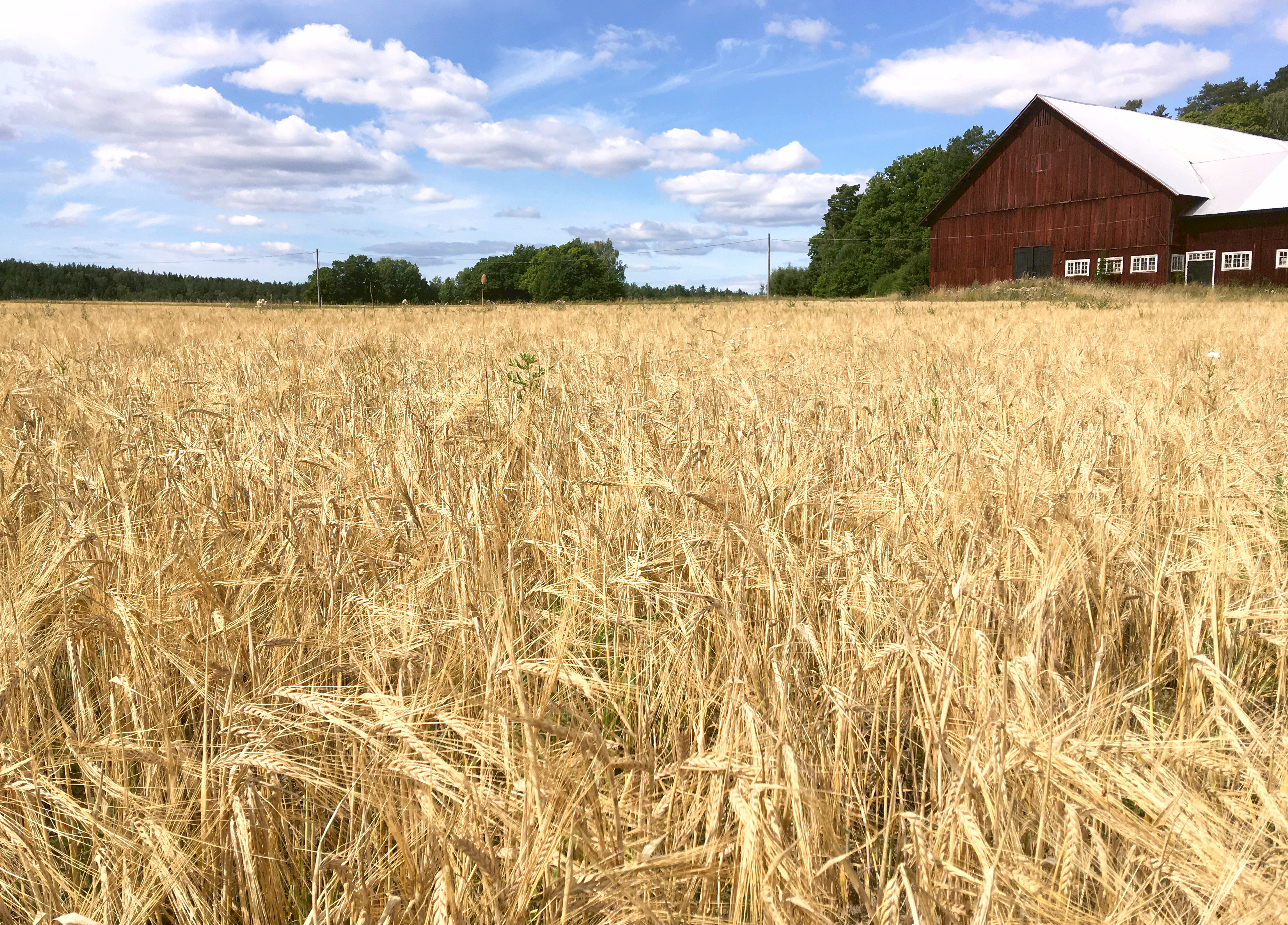 På Aspens naturstig, Kulturlandskapet vid Lindhovs gård.